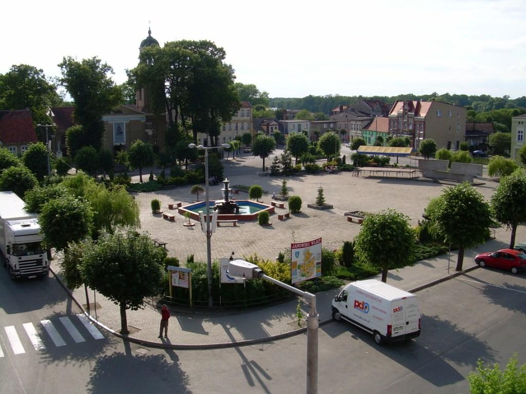 Janowiecki rynek; Plac Wolności